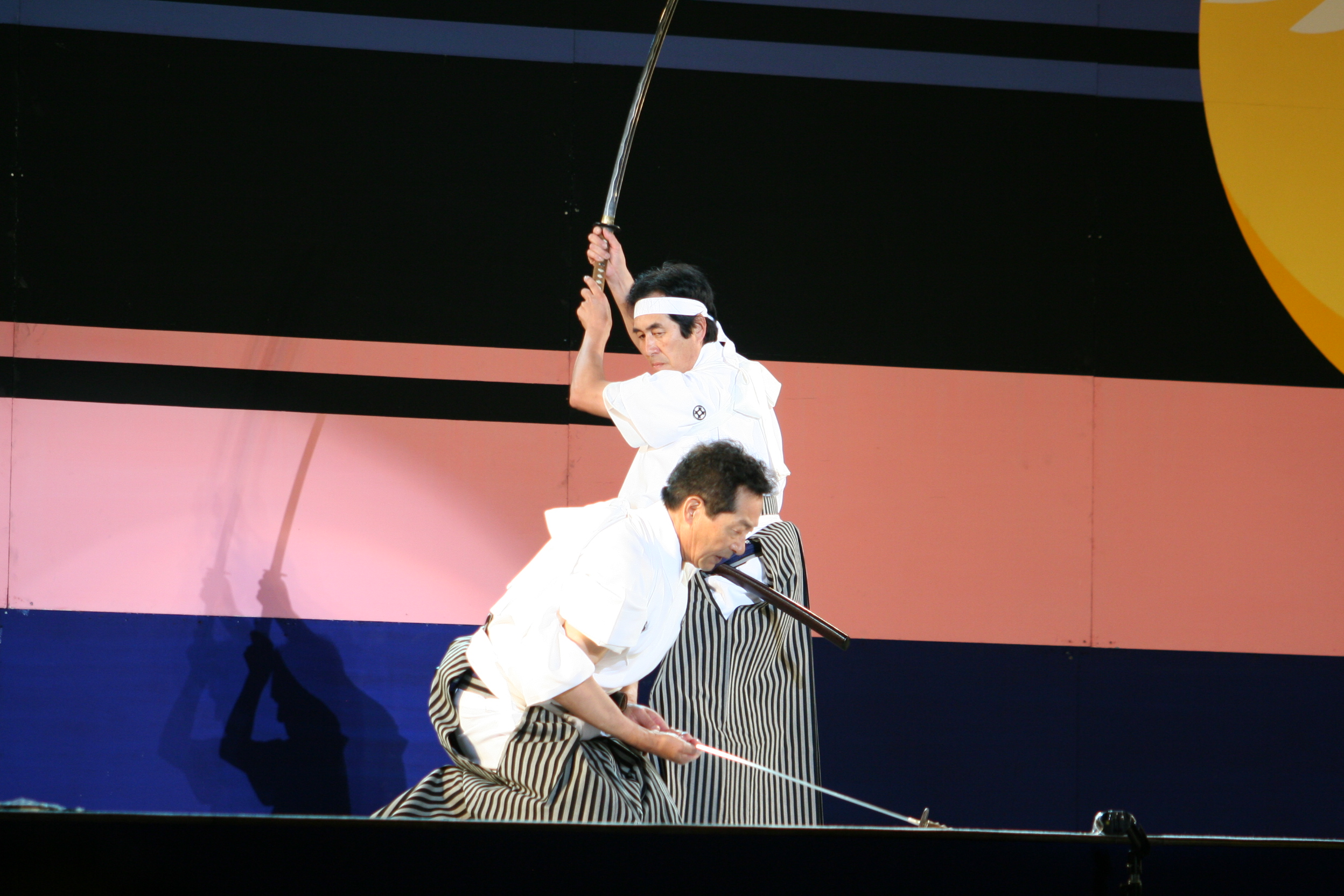 2009年10月3日に姫路城三の丸広場にて開催された姫路城観月会の模様。